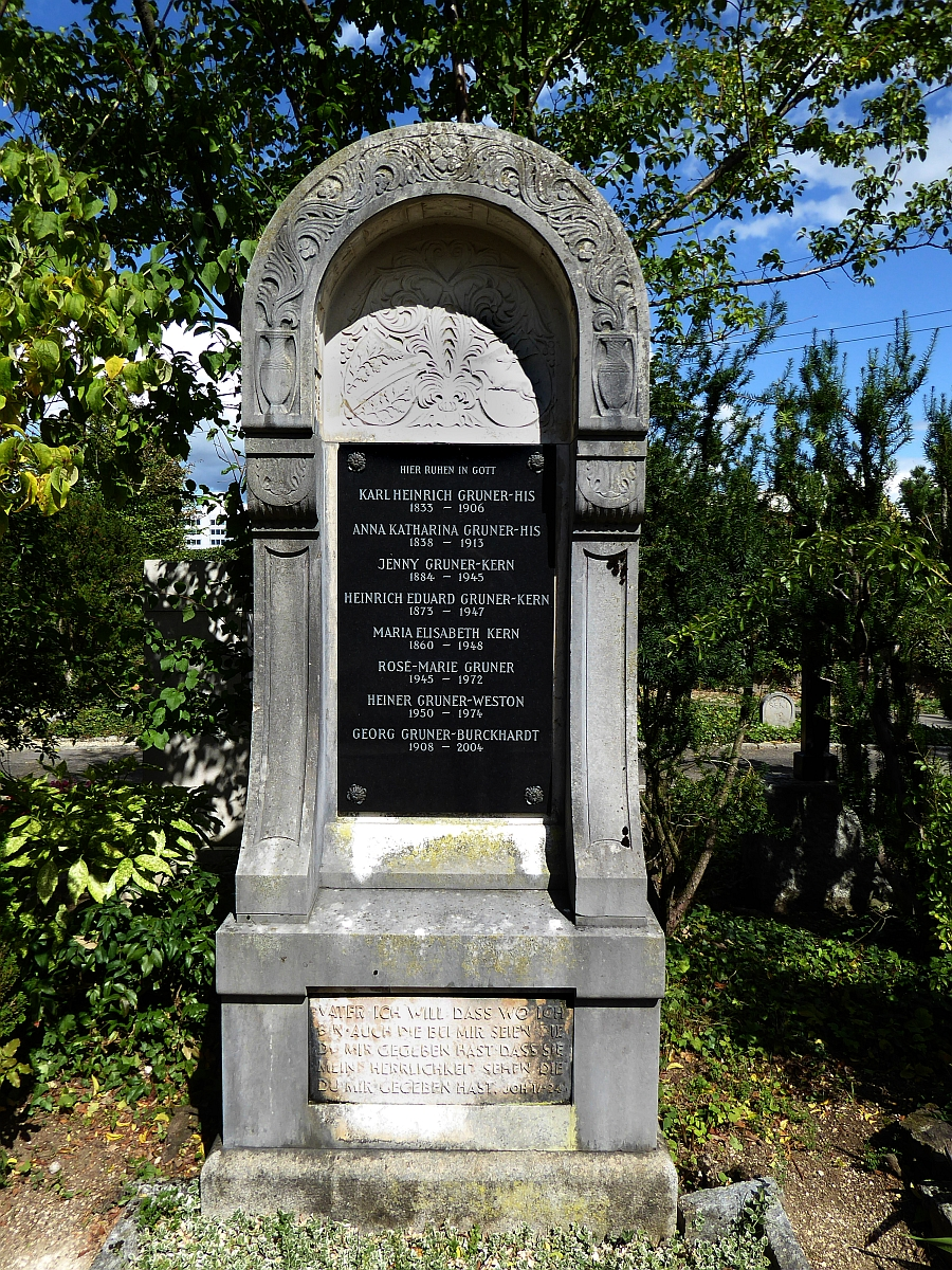 Heinrich Eduard Gruner-Kern (1873–1947) Bauingenieur, Grab auf dem Friedhof Wolfgottesacker, Basel